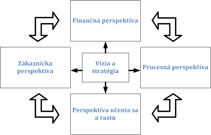 Balanced scorecard podľa Kaplana a Nortona